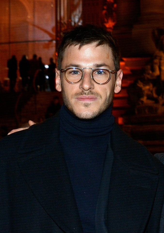 Gaspard Ulliel au dîner des révélations des César du cinéma